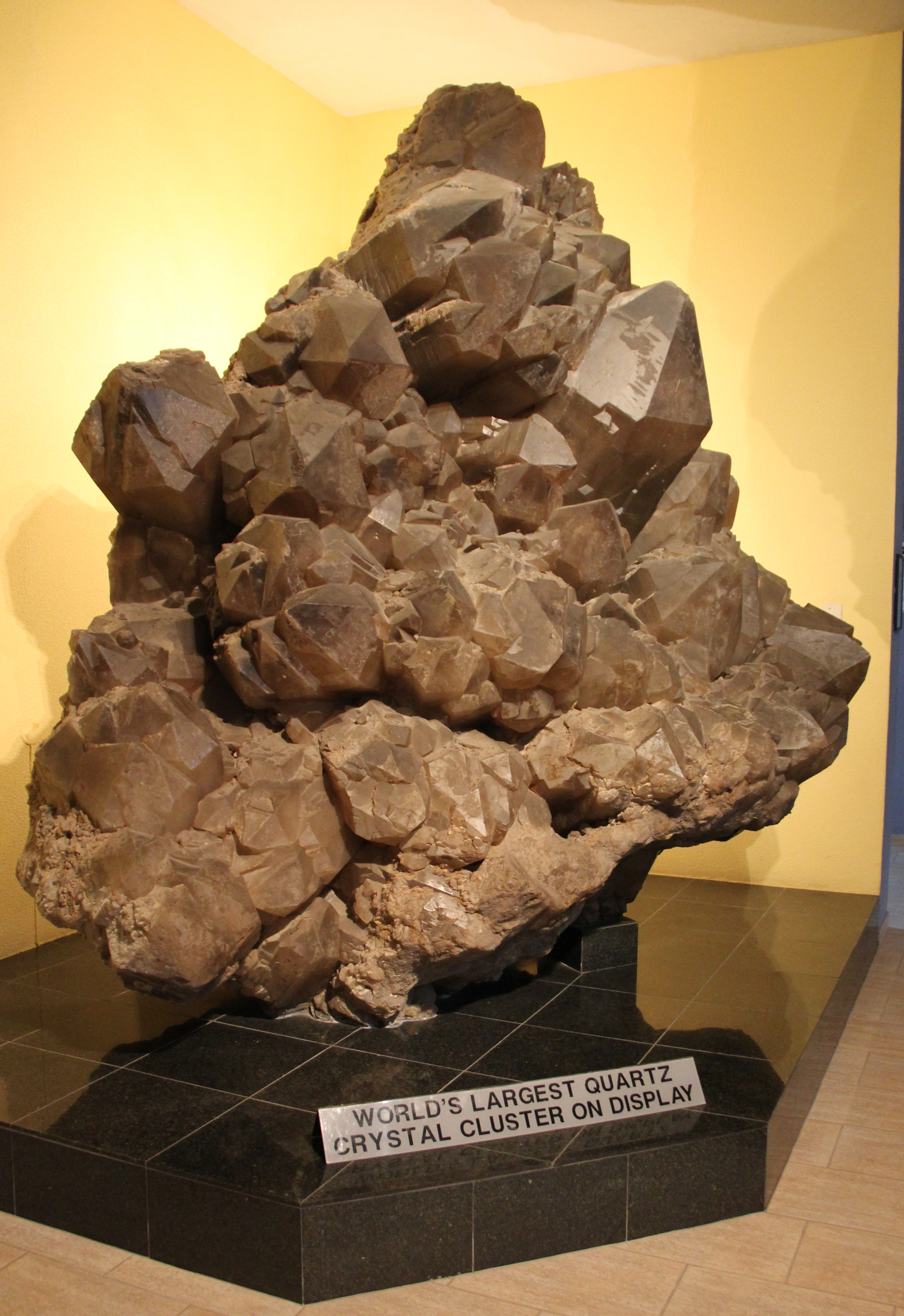 Crystal Gallery